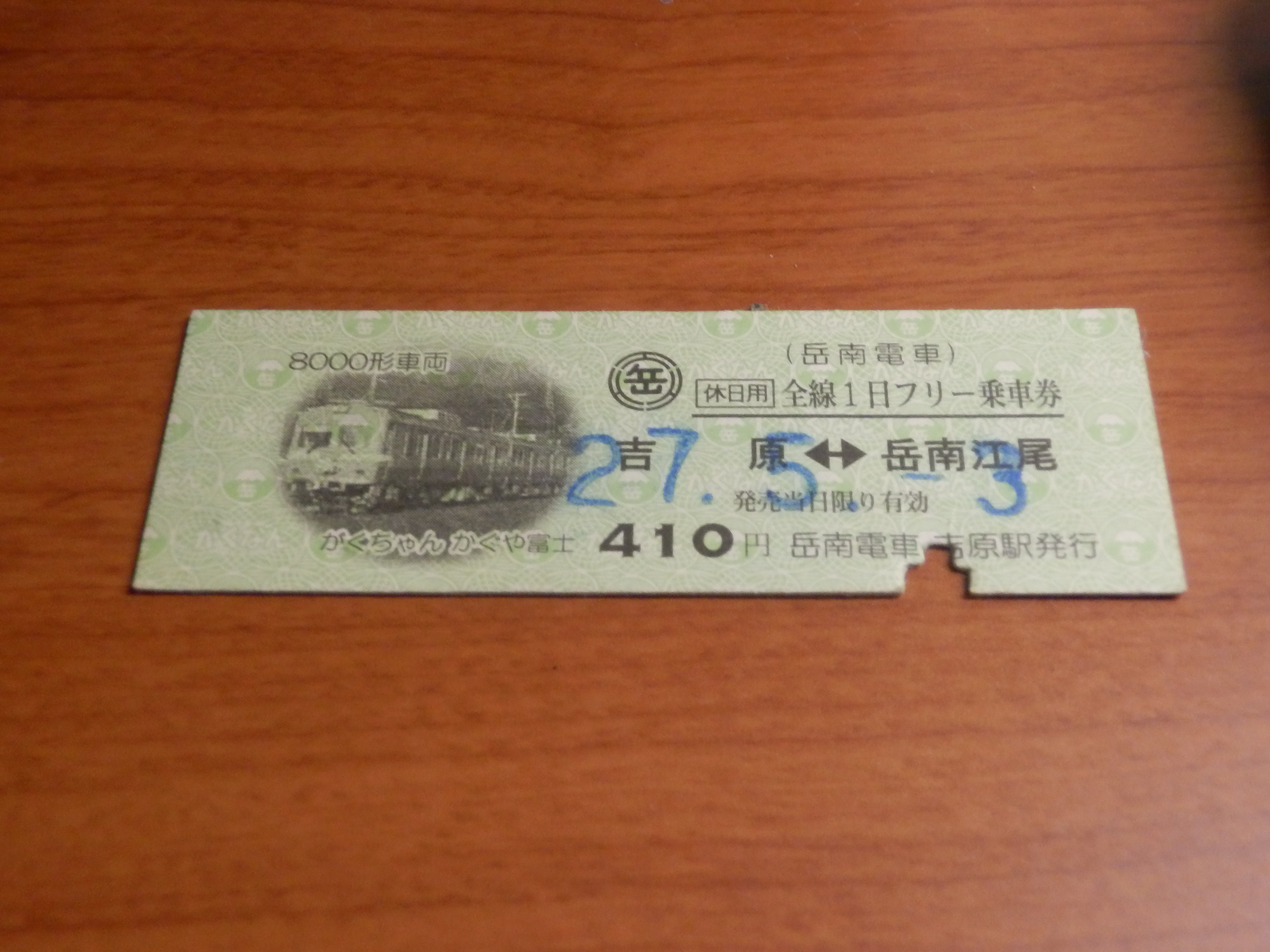 価格改定前の休日用1日乗車券